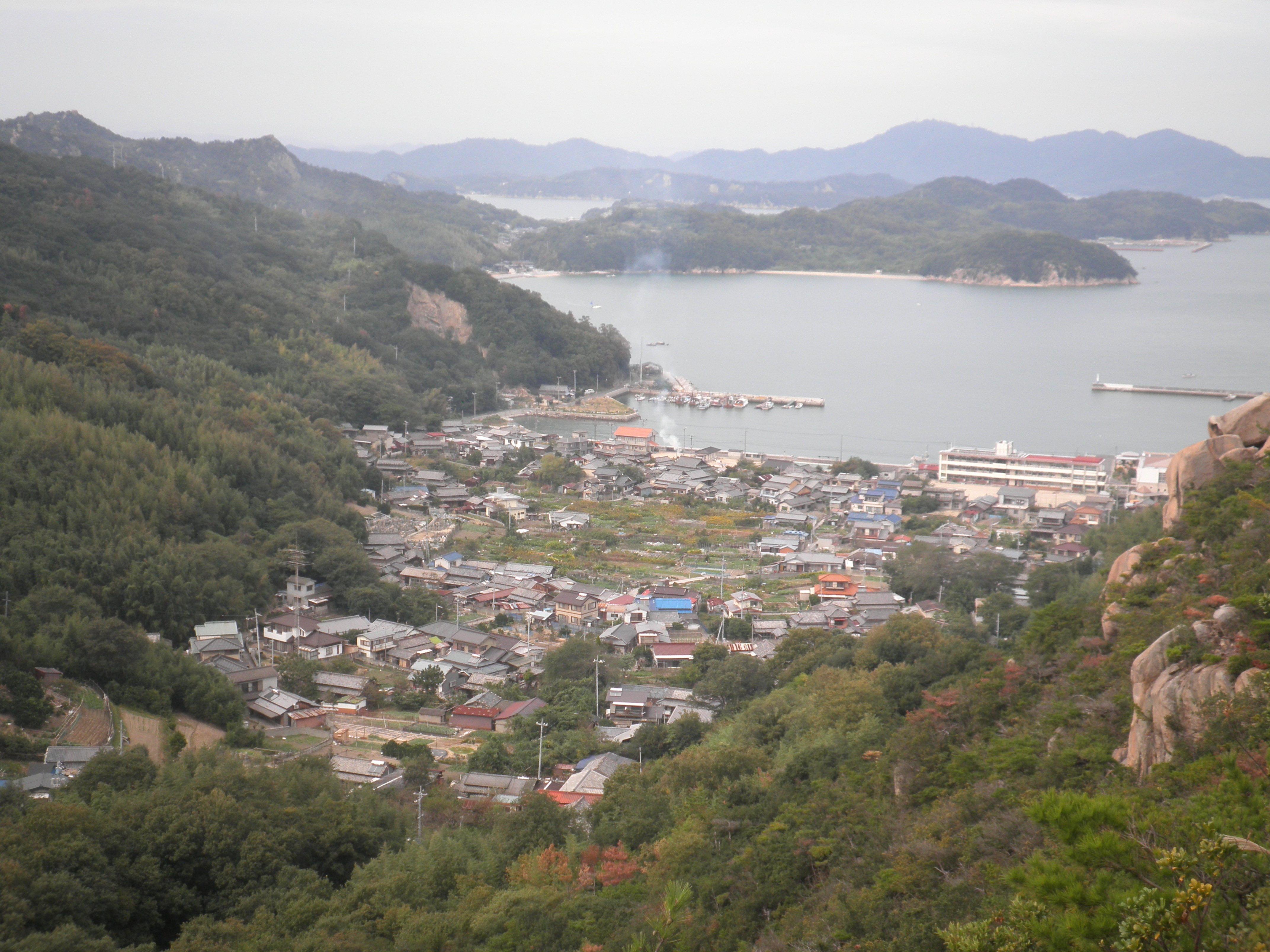 笠岡諸島のja:北木島にあるバックリ山中腹から眺めた金風呂集落